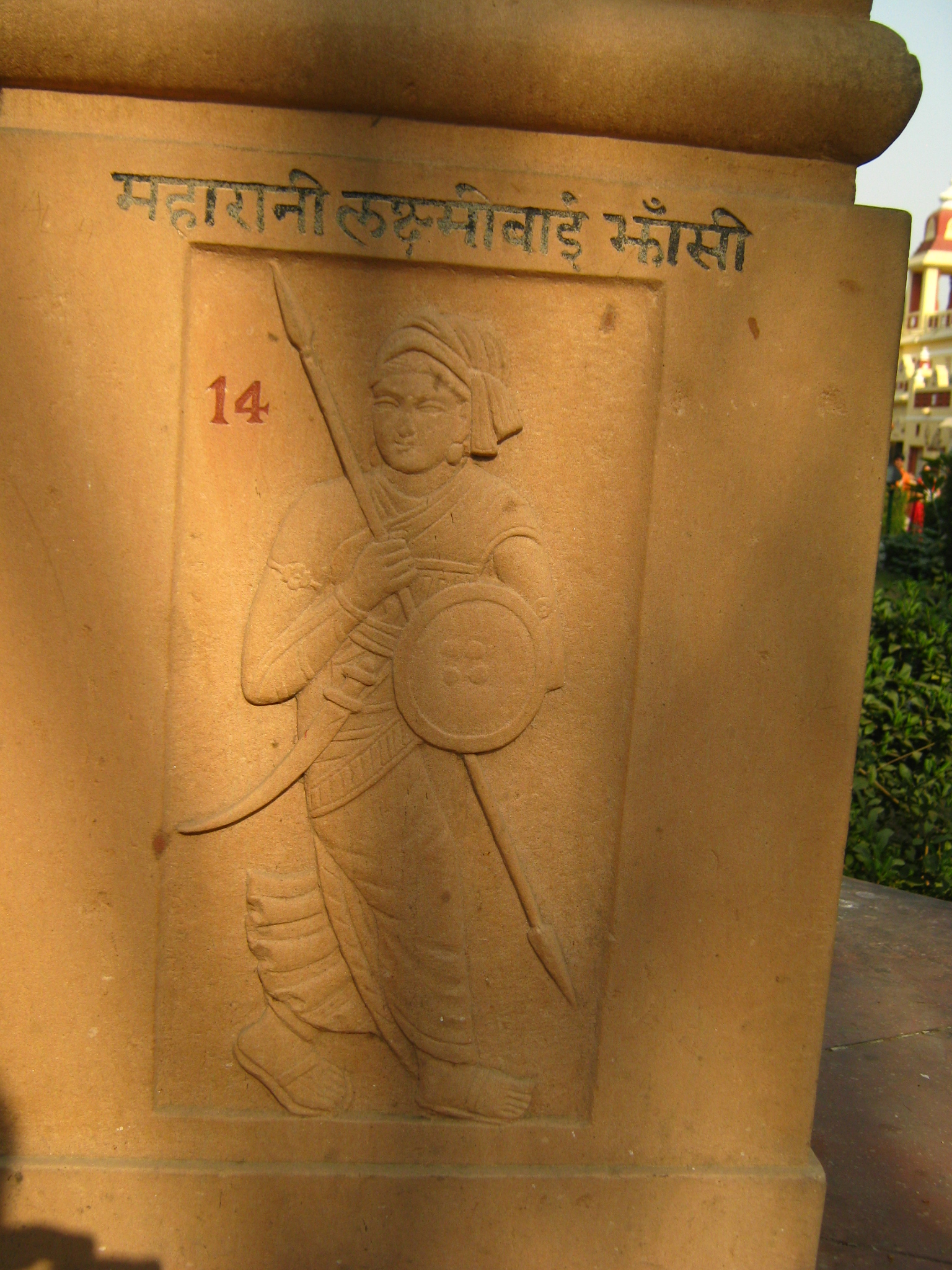 बिरला मंदिर, दिल्ली में लक्ष्मीबाई का भित्ति चित्र